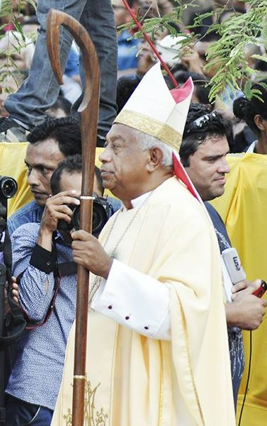 Tetun: Basílio do Nascimento